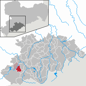 Bockau im Erzgebirgskreis, Sachsen